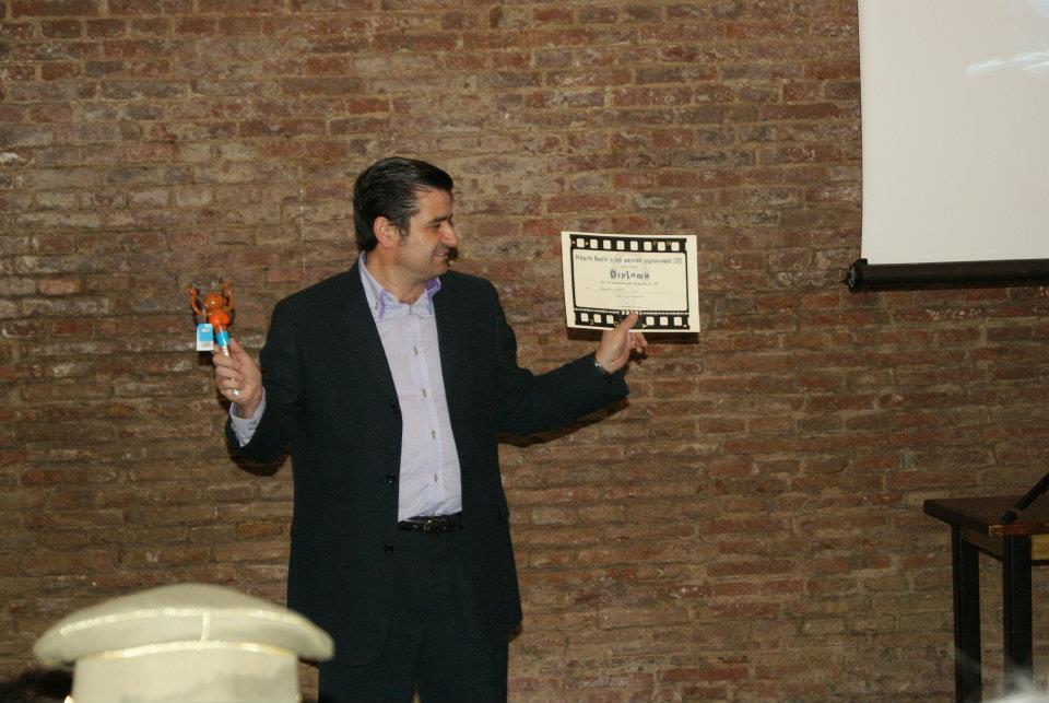 Alejandro Martín Laredo, Premio mudito 2012 al figurante con más tiempo en plano.